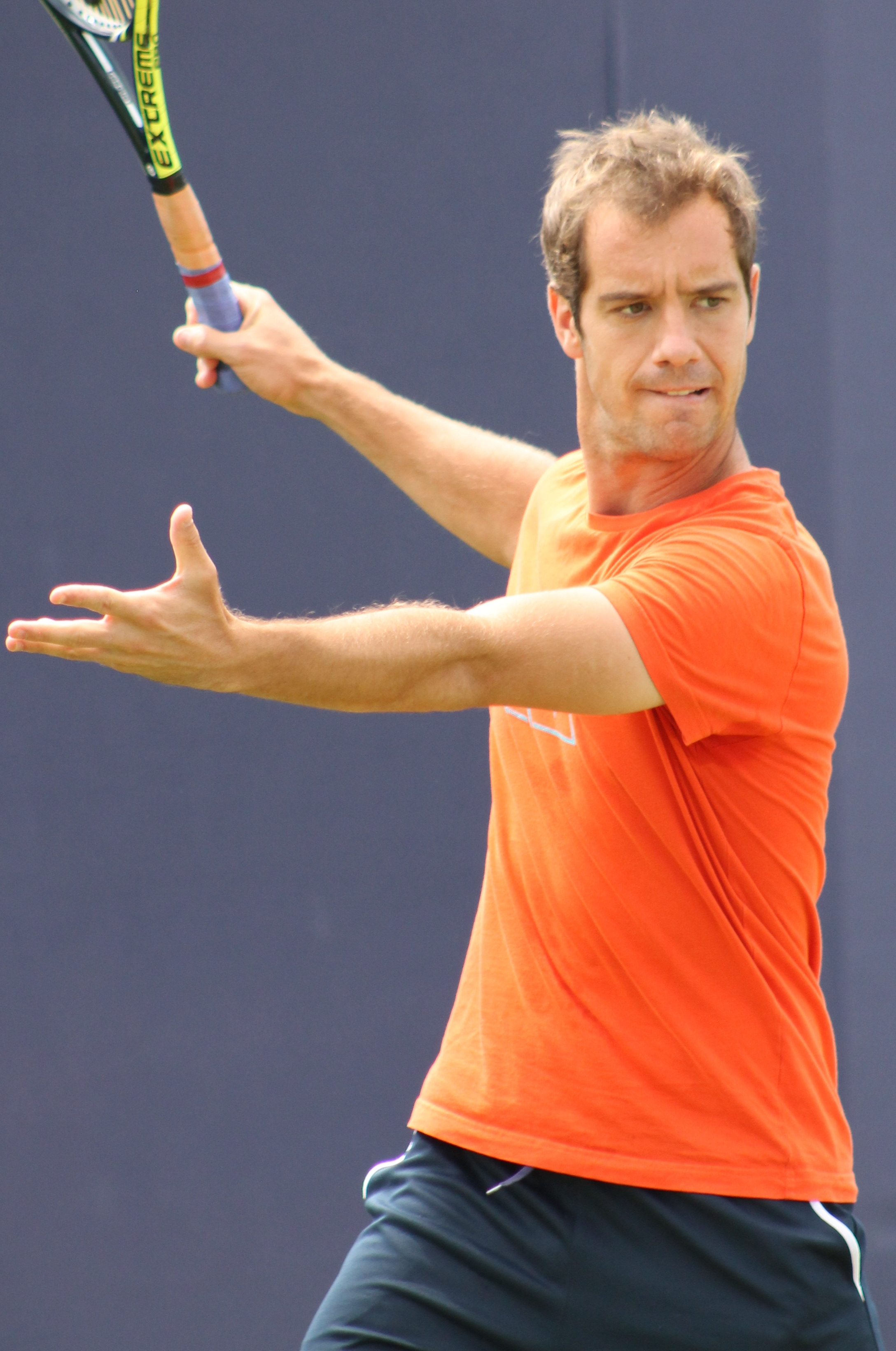 Gasquet QC15 (32)